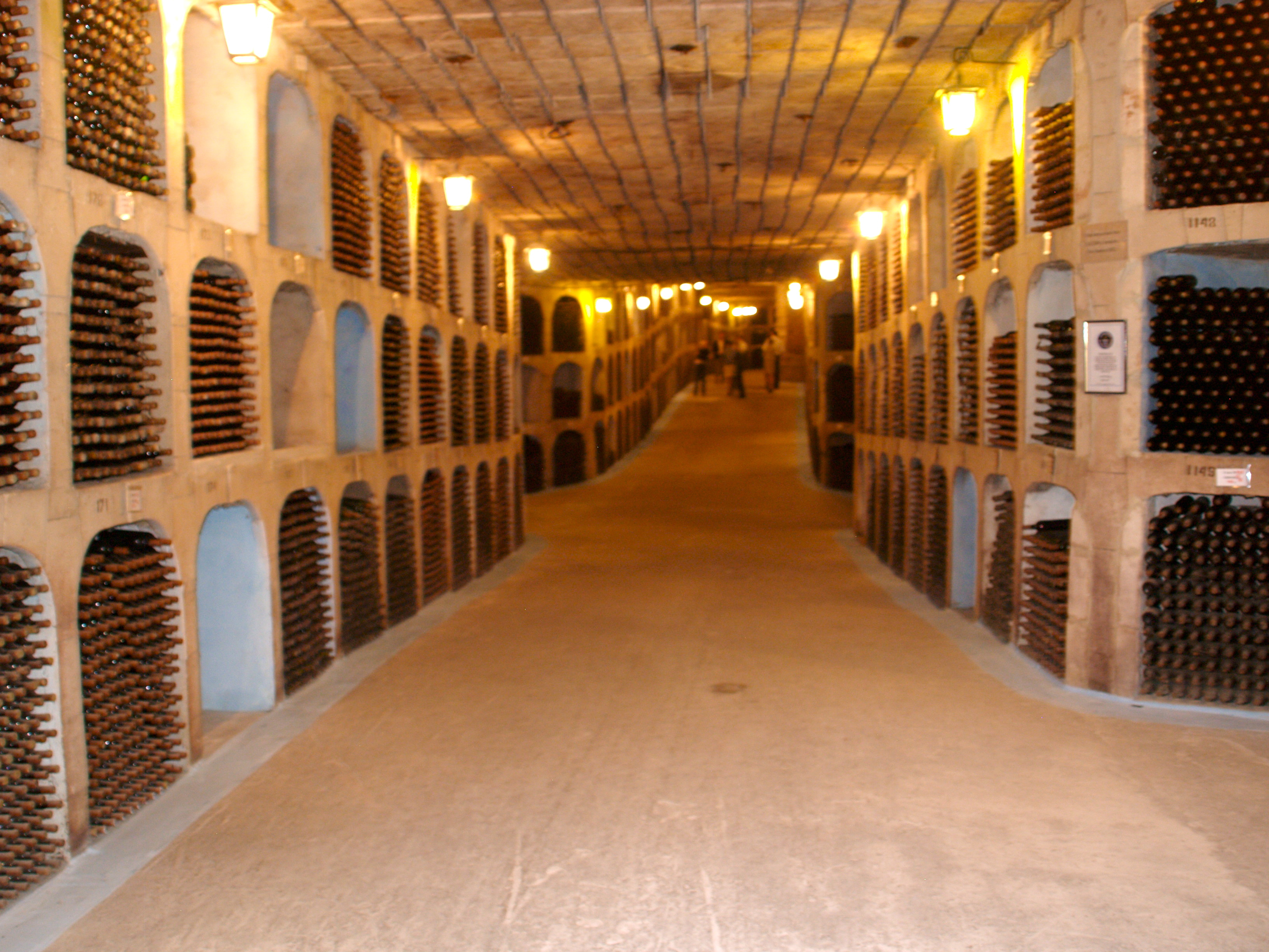 Mileştii Mici